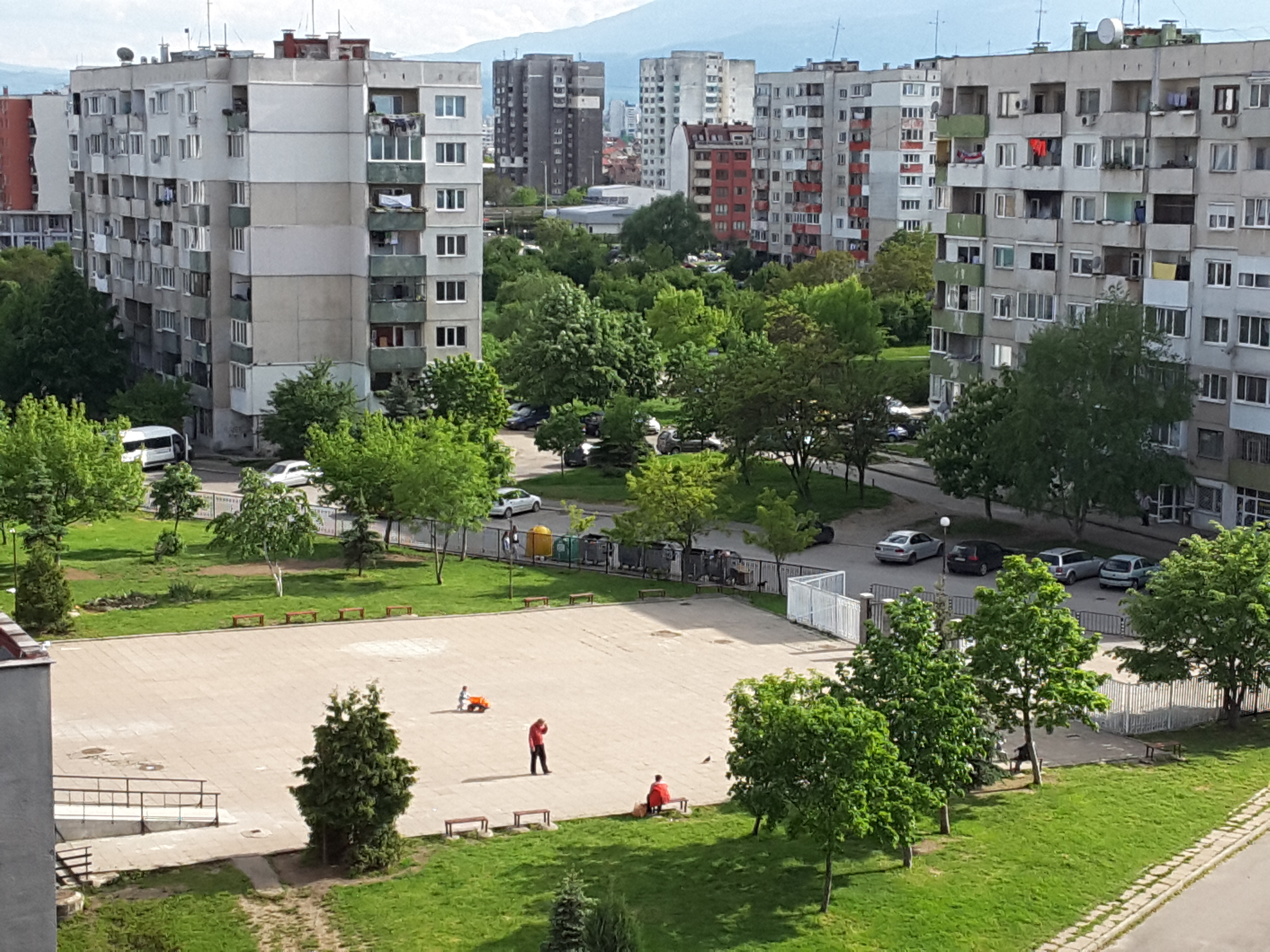 Двор на 199 ОУ " Св. Апостол Йоан Богослов" в квартал Левски Г